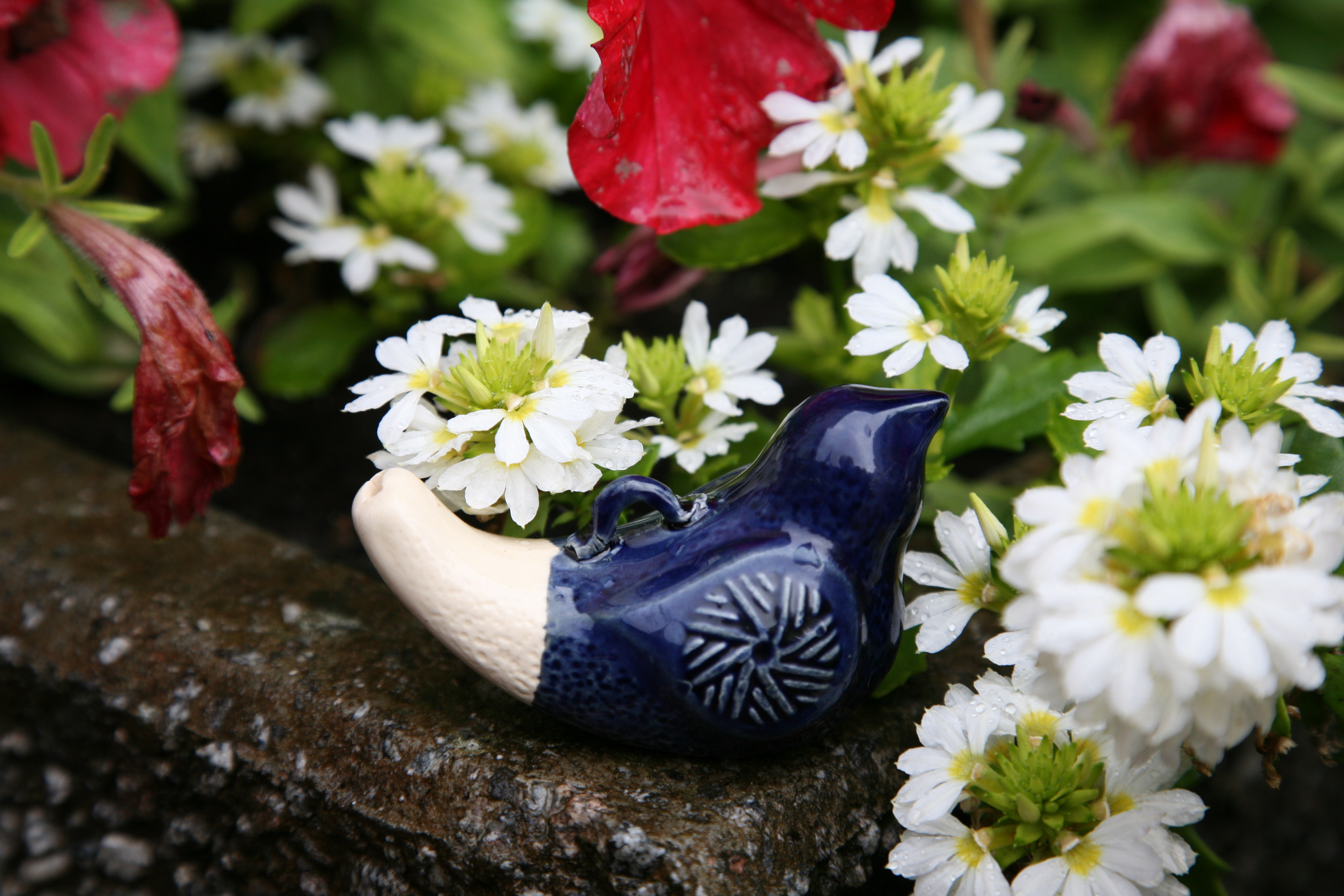 Savipiilu ehk pardipill ehk savipill, Leedu keraamikute taies, eesti rahvapill.